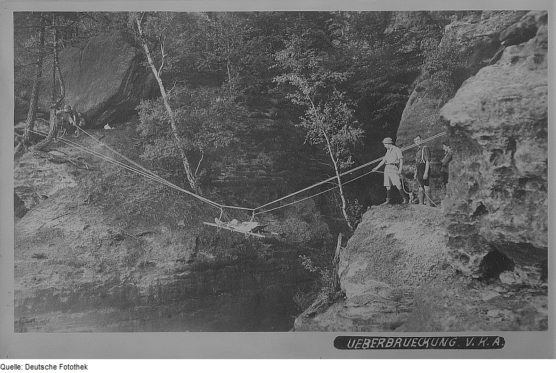 Original image description from the Deutsche Fotothek Abseilübung am Hohen Torstein. Bergung eines Verletzten mit Trage über eine Schluchtüberbrückung